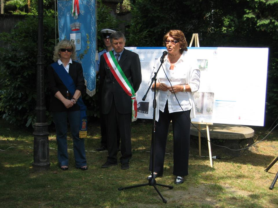 Becky Behar all'inaugurazione del pannello sulla strage di Meina, Parco della fratellanza, Meina, 2006